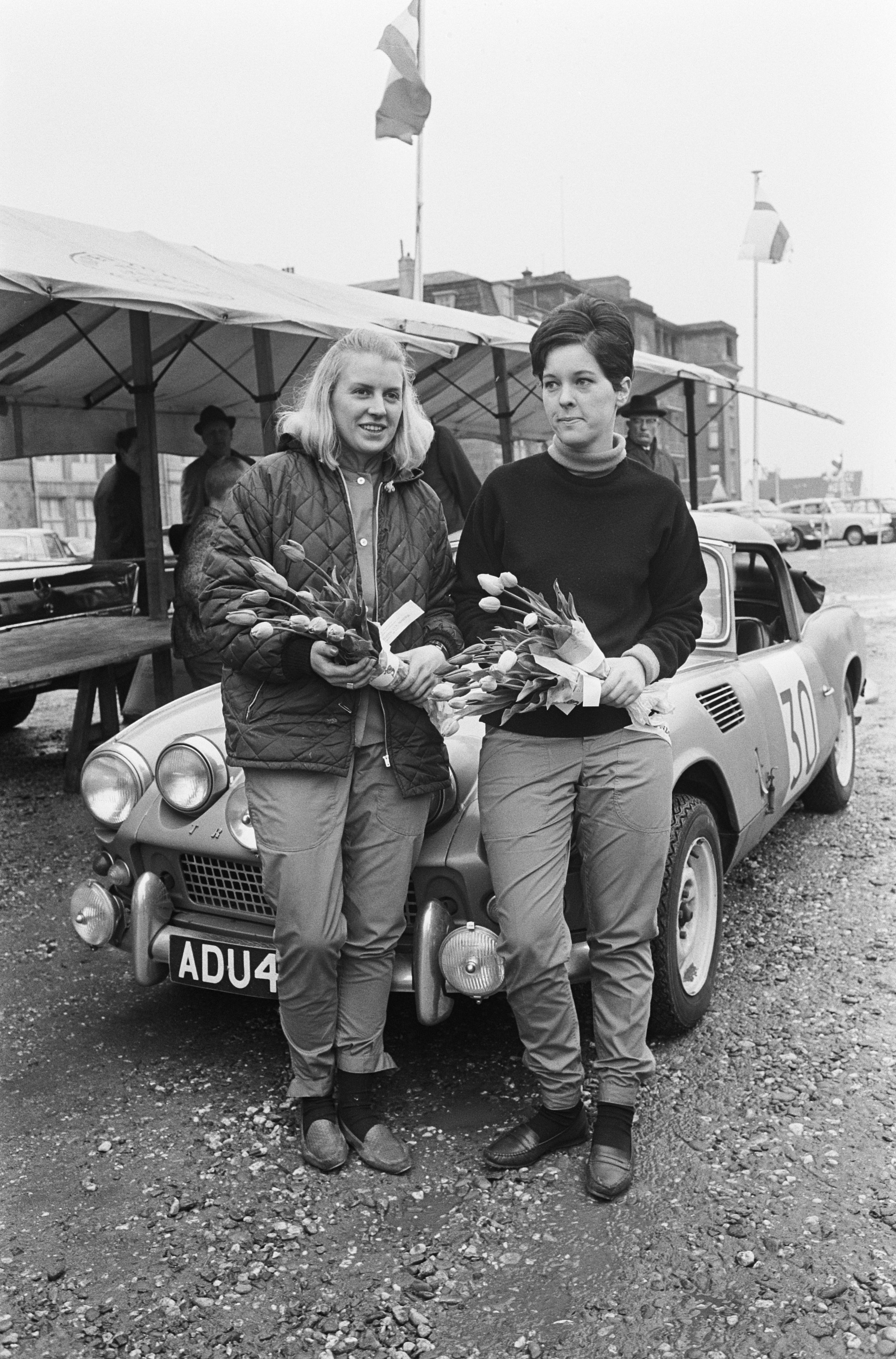 Collectie / Archief : Fotocollectie Anefo Reportage / Serie : Tulpenrally 1965 Beschrijving : Tulpenrallye 1965, de Engelse dames Valerie Pirie (links) en Susan Reeves met Triumph Spitfire Datum : 28 april 1965 Locatie : Noordwijk, Zuid-Holland Trefwoorden : autorally's, autosport, sport Persoonsnaam : Pirie, Valerie, Reeves, Susan Instellingsnaam : Tulpenrally Fotograaf : Fotograaf Onbekend / Anefo Auteursrechthebbende : Nationaal Archief Materiaalsoort : Negatief (zwart/wit) Nummer archiefinventaris : bekijk toegang 2.24.01.05 Bestanddeelnummer : 917-7083